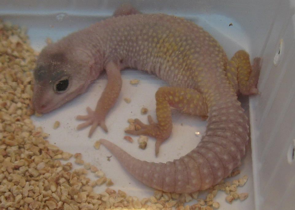 Leopárdgekkó "Blizzard" színváltozata.